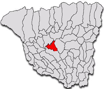 Categorie:Hărţi ale judeţului Gorj